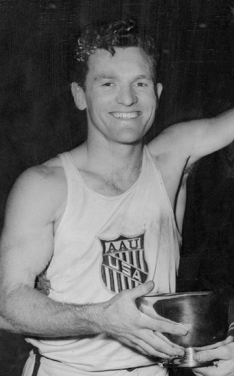 1951 Evening Star Games Pole Vault Robert Richards and Don Laz Press Photo